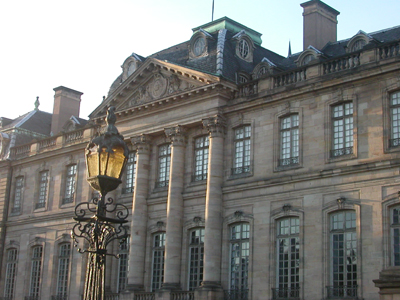 Palais des Rohan, Strasbourg